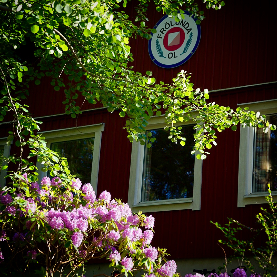 Frölunda OL:s klubbstuga